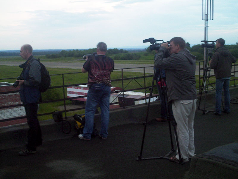 Споттеры в аэропорту Иркутска ждут самолёт. Втоорая споттинг-сессия «Аэропорта Иркутск».